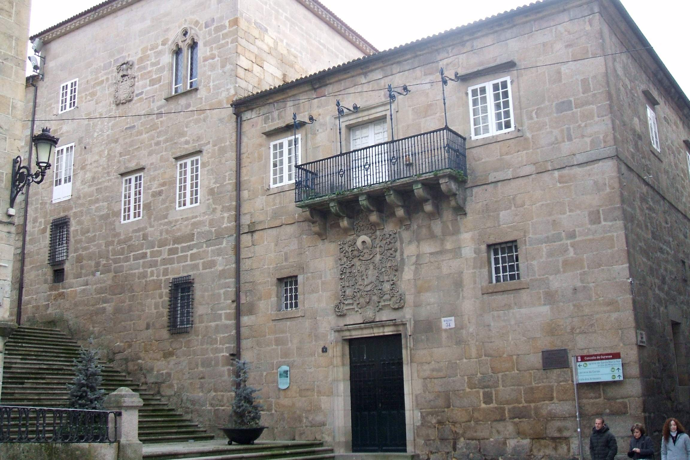 Museo Arqueológico de Orense (ex Palacio Episcopal)